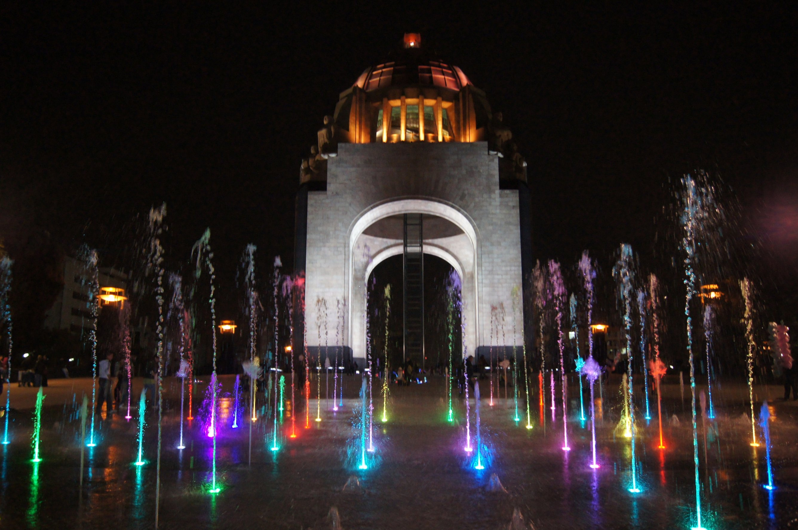 Fuentes frente al Mnto de la Revolución